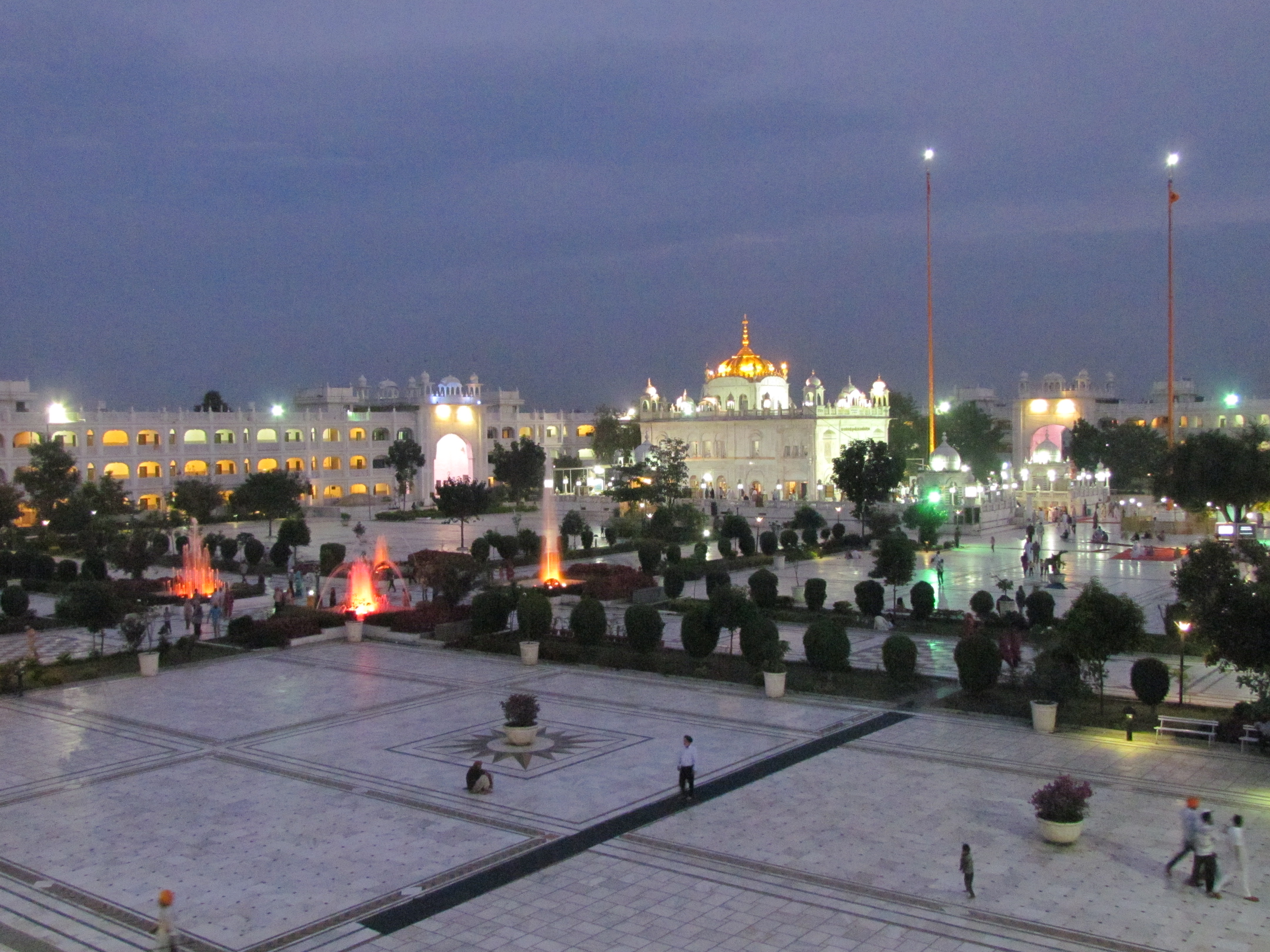 Gurudwara shri sachkhand hazur sahib